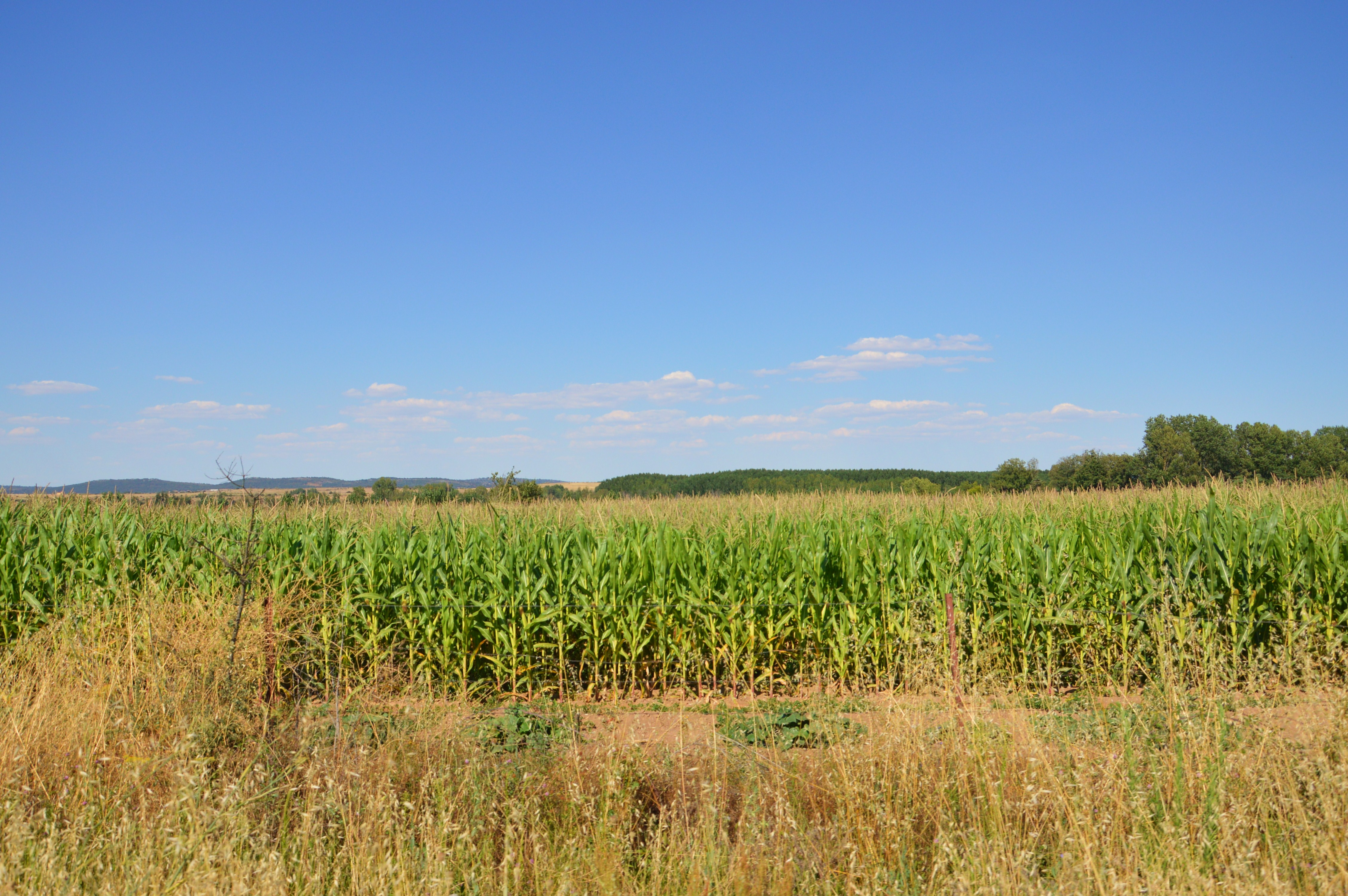 Alrededores de Águeda